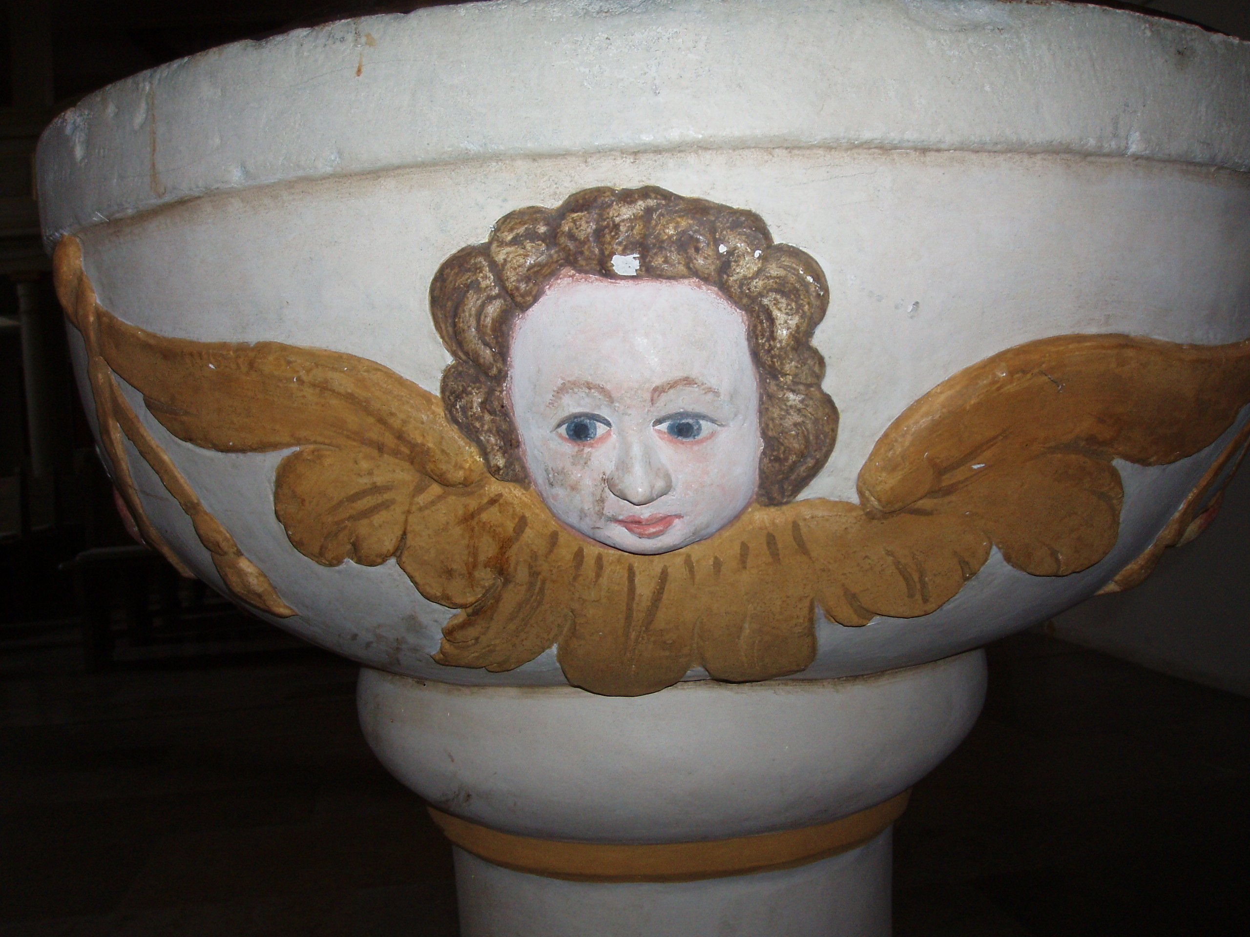 Taufstein in St. Cyriak in Dürnau